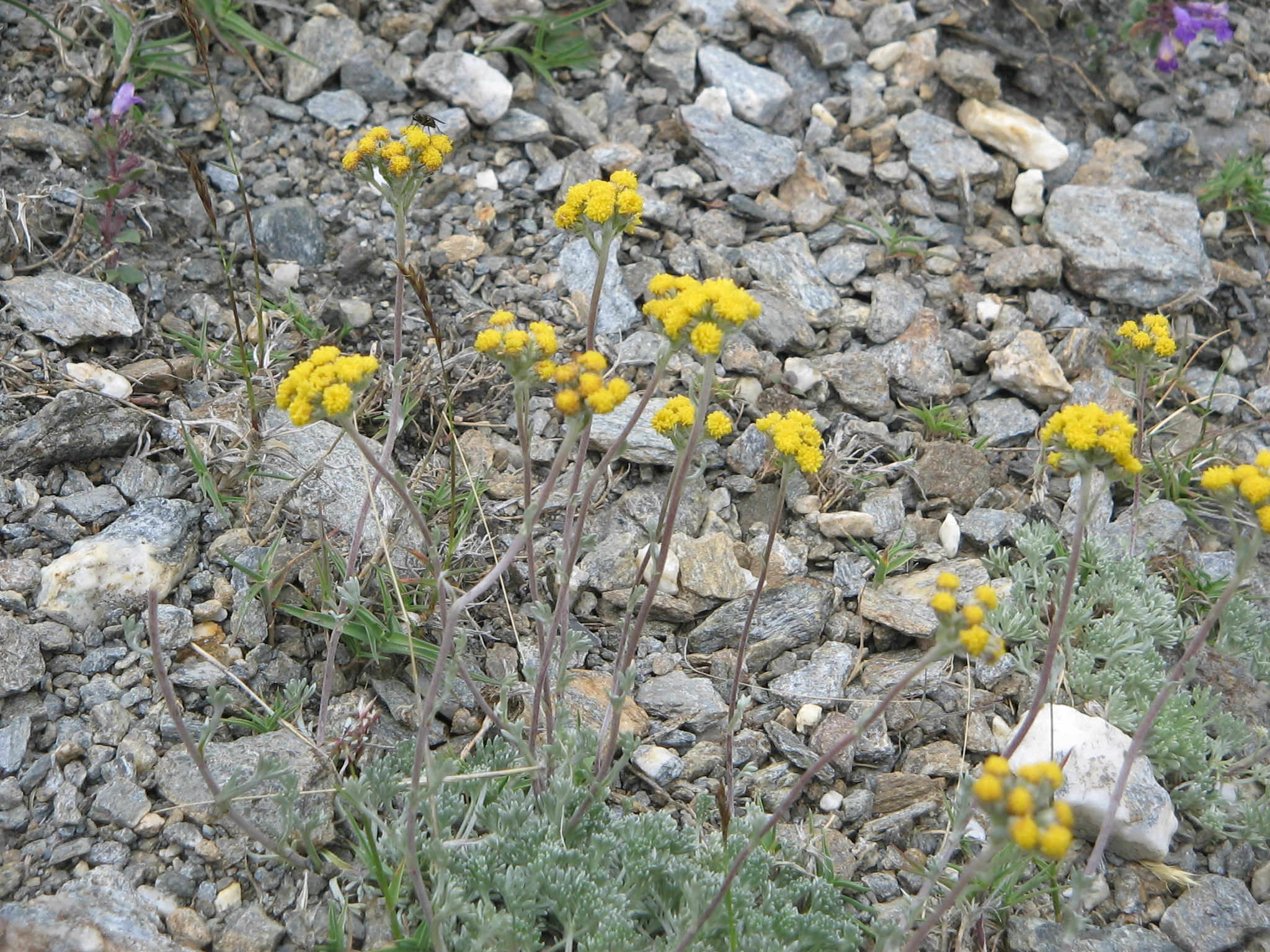 Artemisia glacialis dans la Vanoise